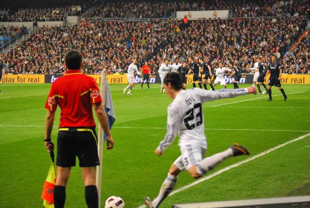 Mesut Özil sacando un corner, en un partido de La Liga. Real Madrid 4 - Real Sociedad 1